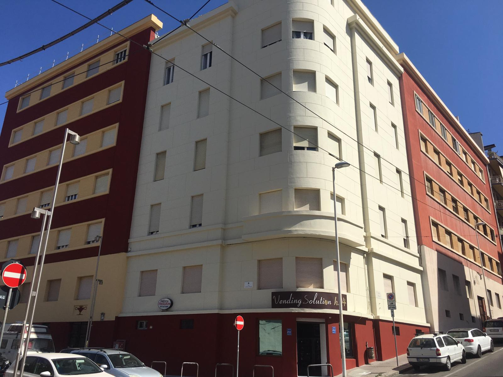 Il palazzo Fadda-Tonino nel 2019